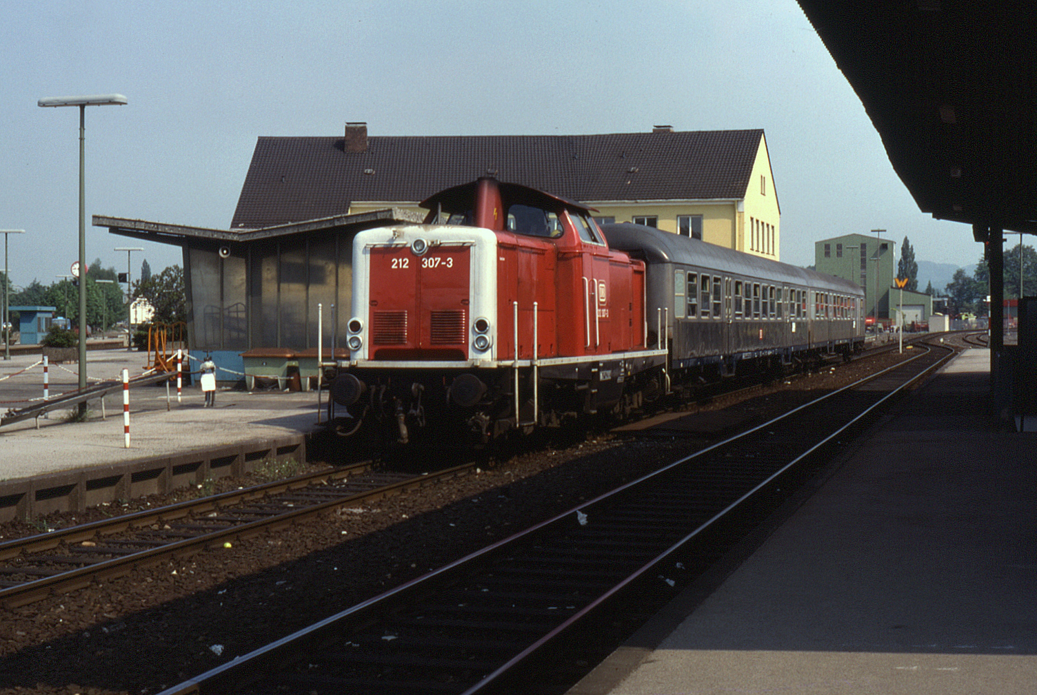 212.307 at Fröndenberg, 8 May 1990.